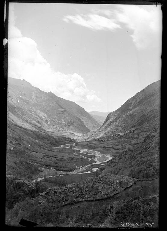 Imatge